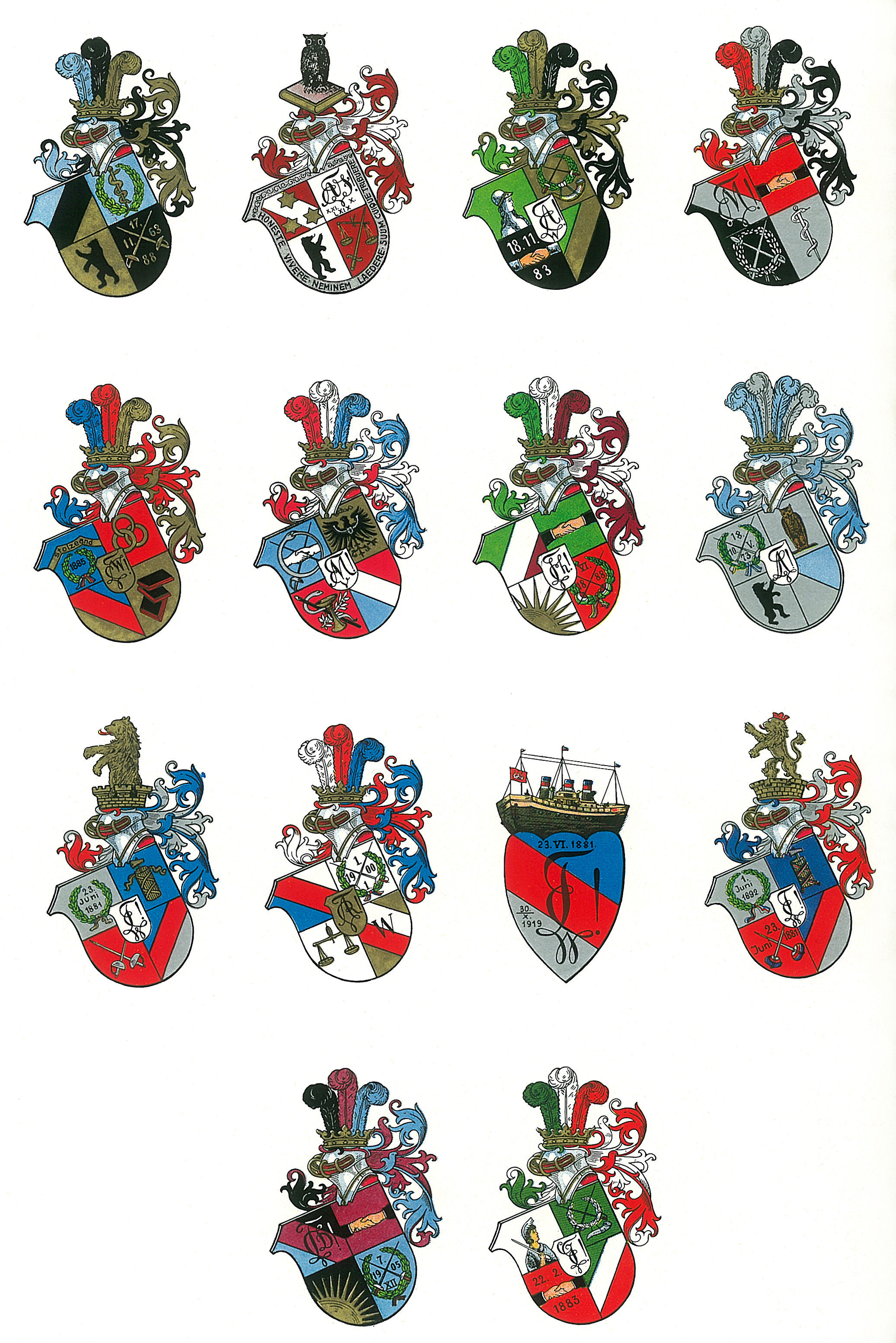 Studentenwappen der paritätischen Verbindungen